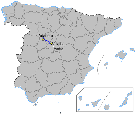 Mapa de la autopista AP6